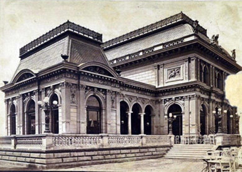 Nemzeti Szalon épülete (Erzsébet téri Kioszk)